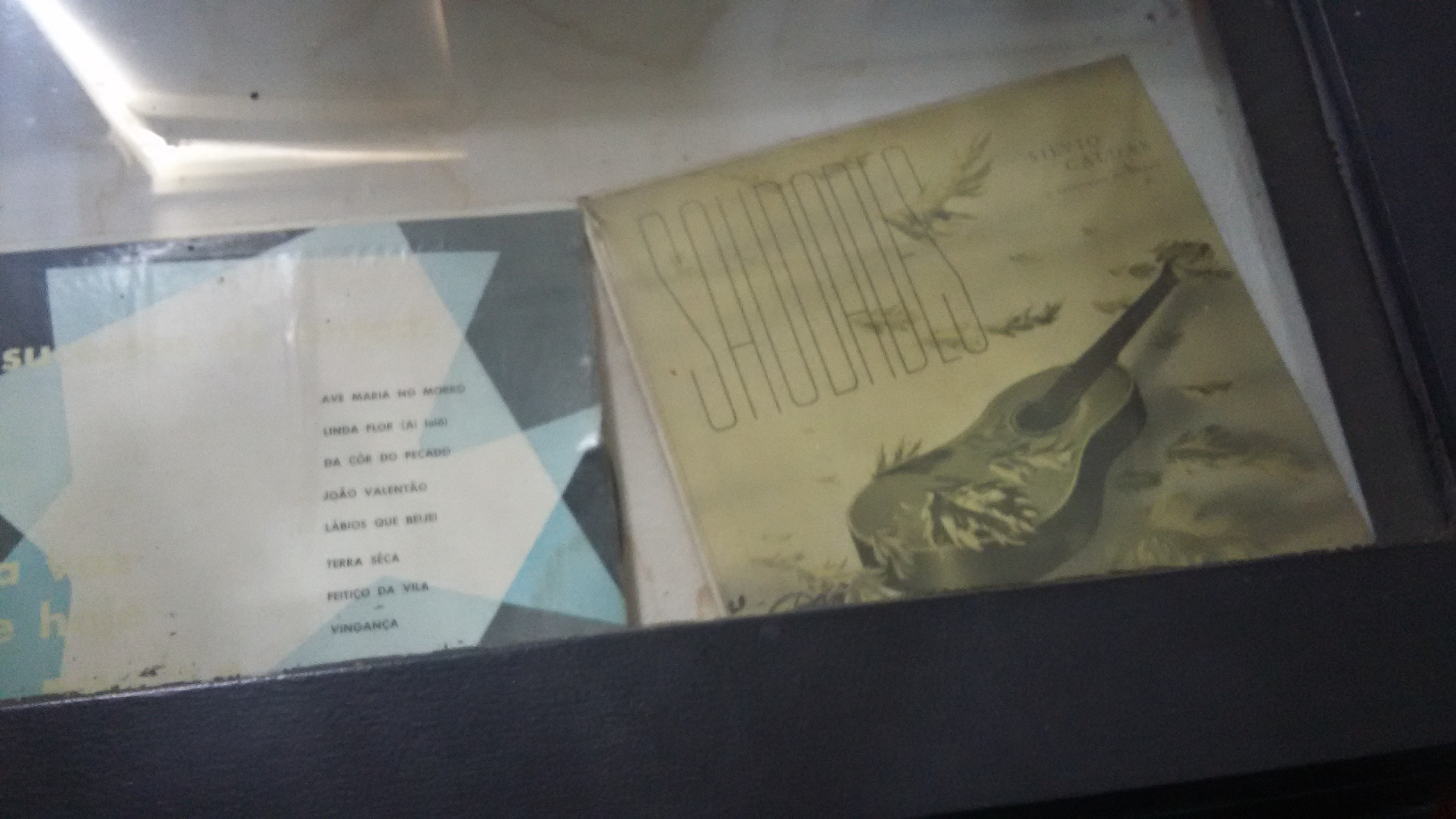 hay también los vinillos del Presidente bossa nova